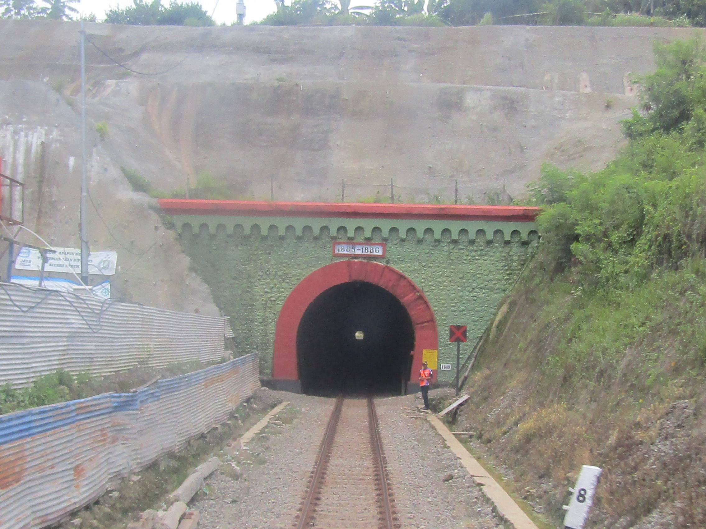 Terowongan Ijo, 2020